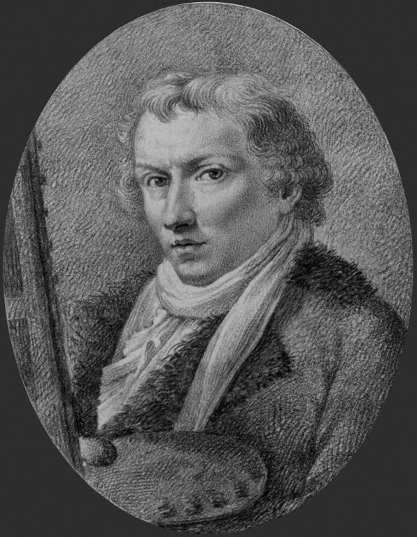 Andreas Seidel (1760-1834), deutscher Historienmaler, kurfürstlicher Hofmaler und Akademieprofessor in München